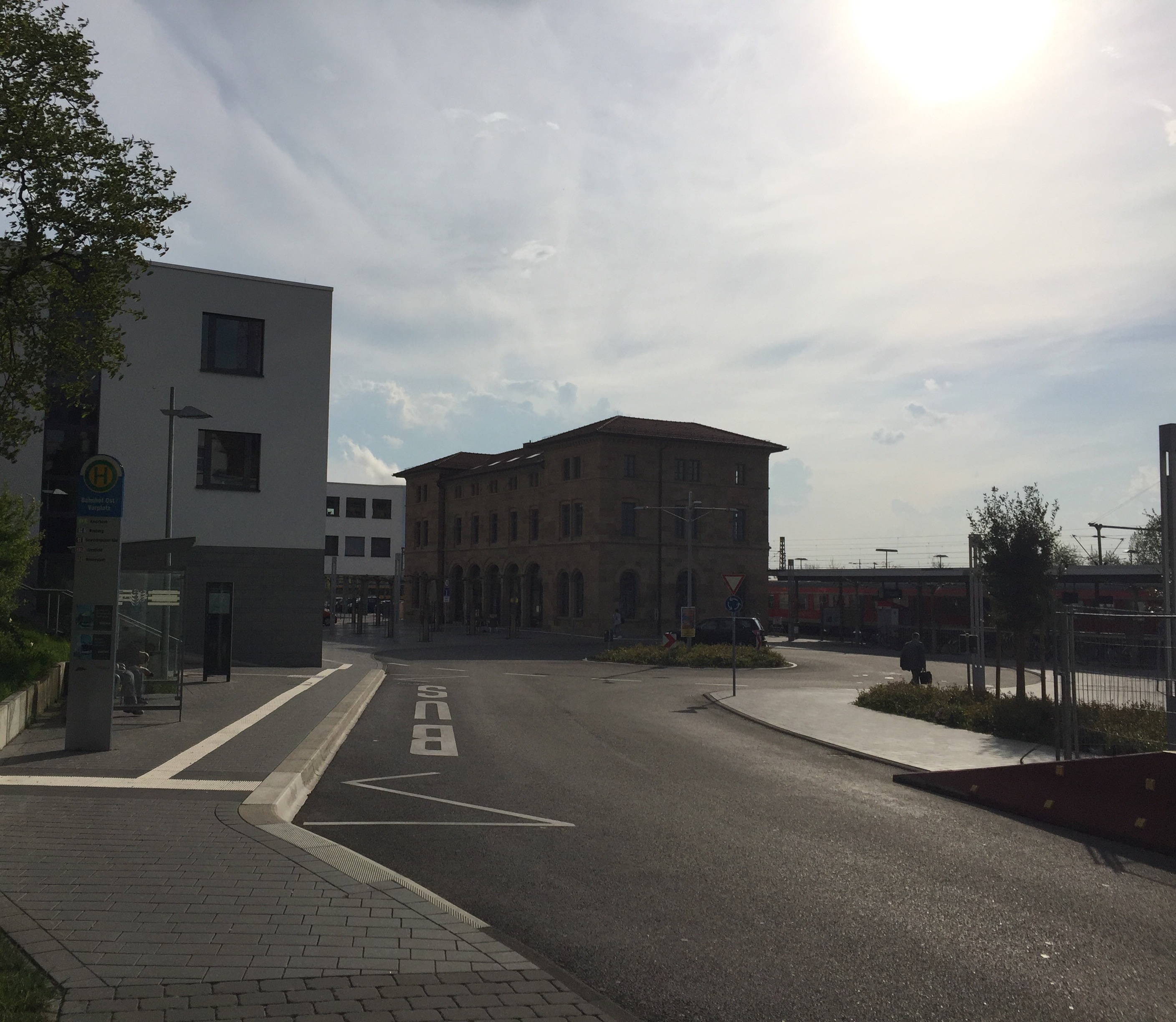 Blick über den Bahnhofplatz auf das Empfangsgebäude.